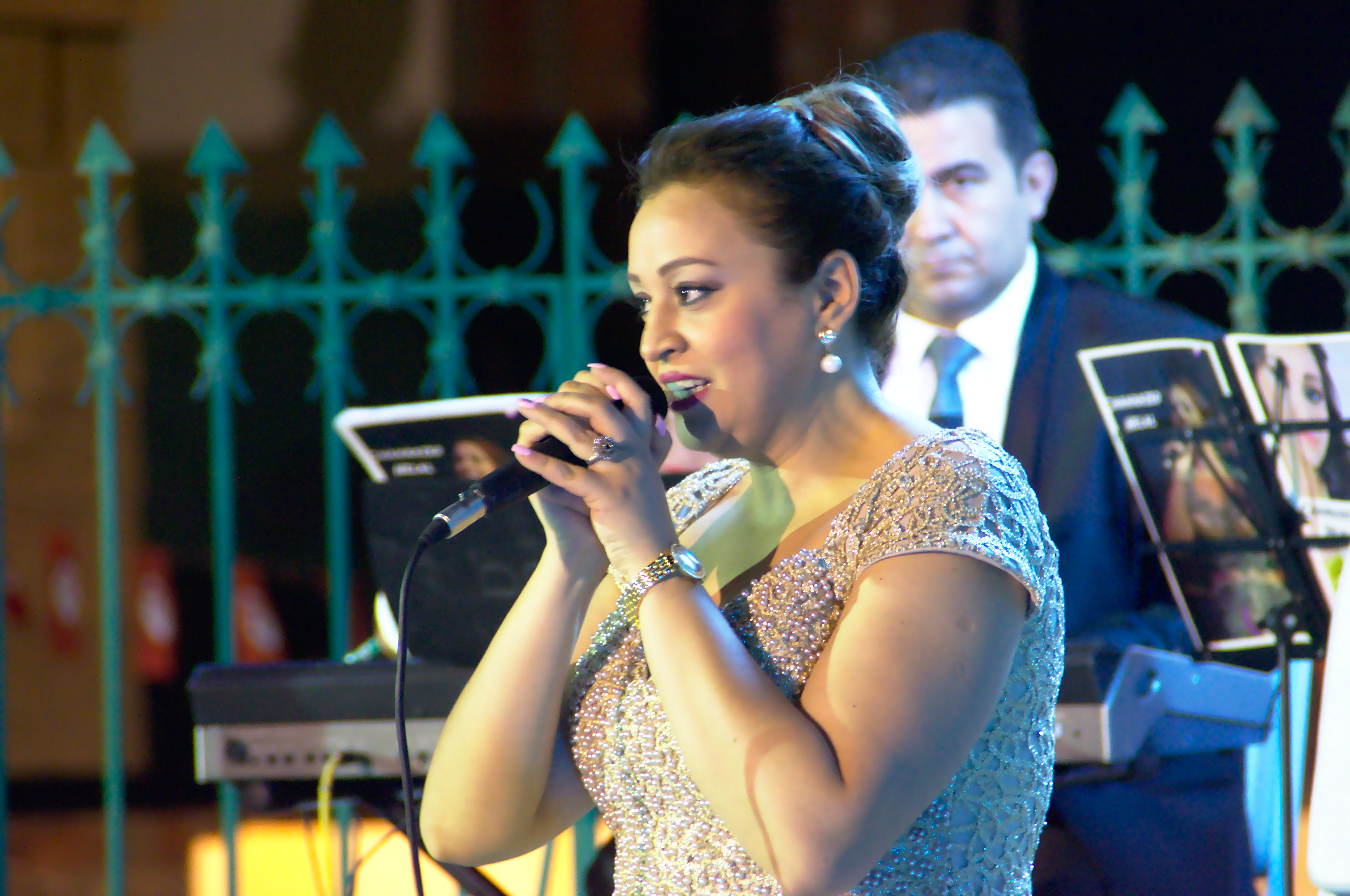 Chahrazed Helal, au festival de la médina de Sayada